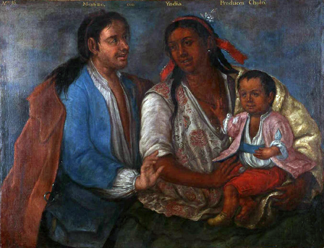 De la serie Los cuadros del mestizaje del Virrey Amat